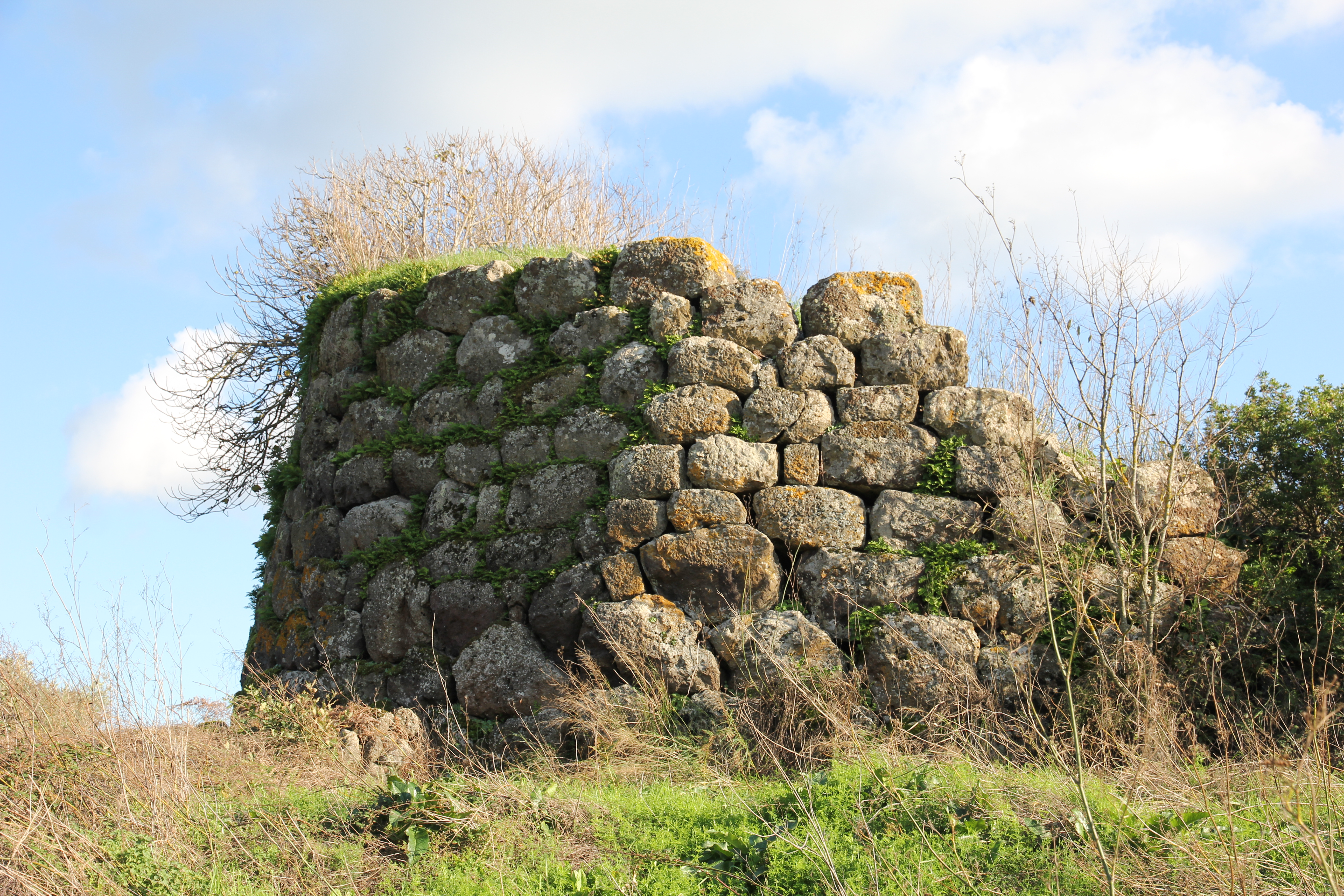 Siligo - Nuraghe Morette